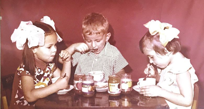 Детское питание